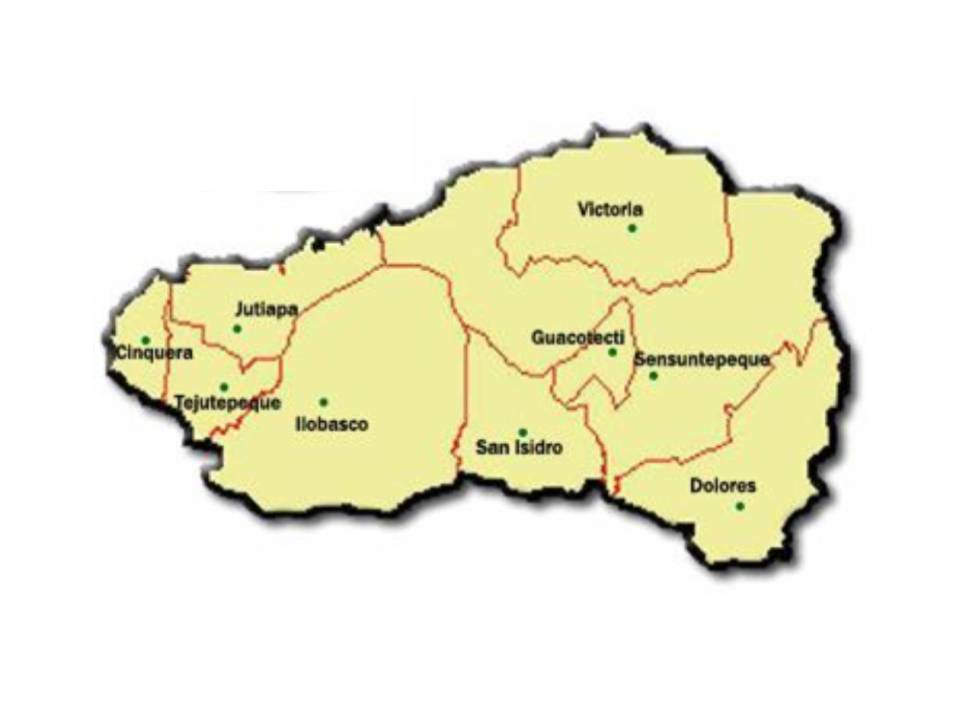 Mapa del departamento de Cabañas, El Salvador